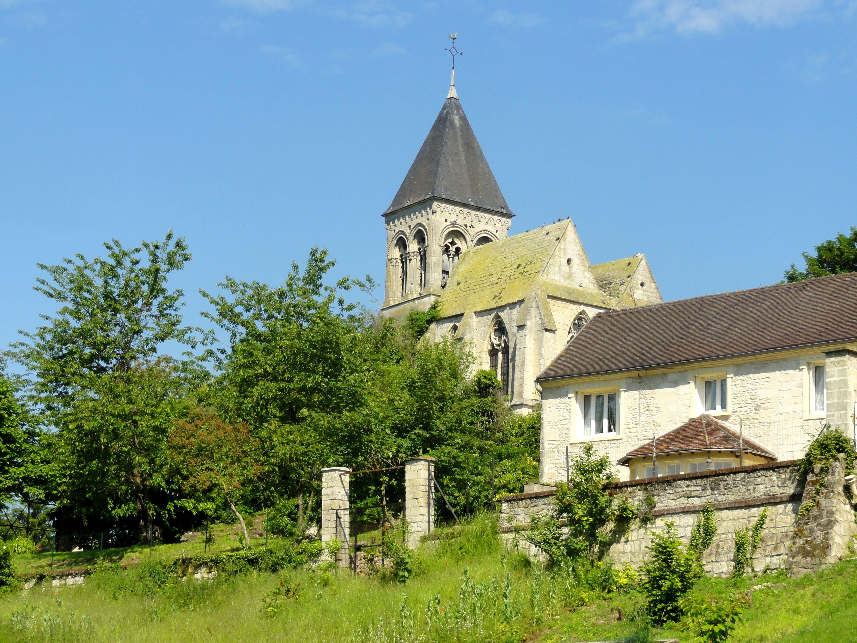 Impasse Saint-Martin.